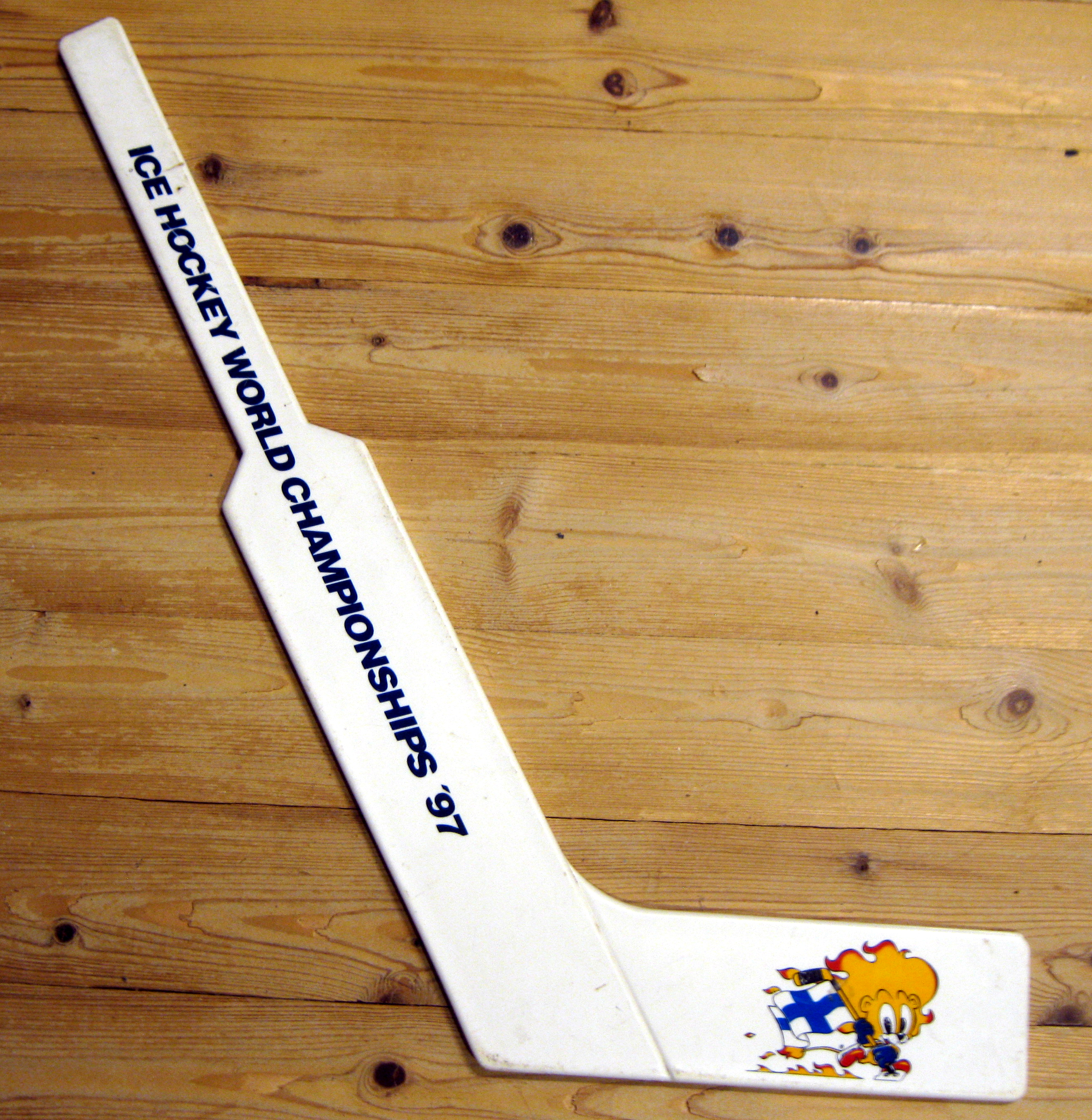 Jääkiekon MM-kisojen 1997 fanituote maila.